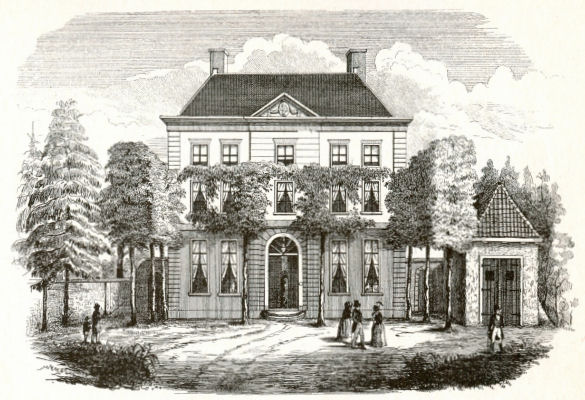 Het Doelenhuis van de St. Jorisdoelen in Schoonhoven. Afgebeeld de situatie rond 1861 (dan als kostschool).